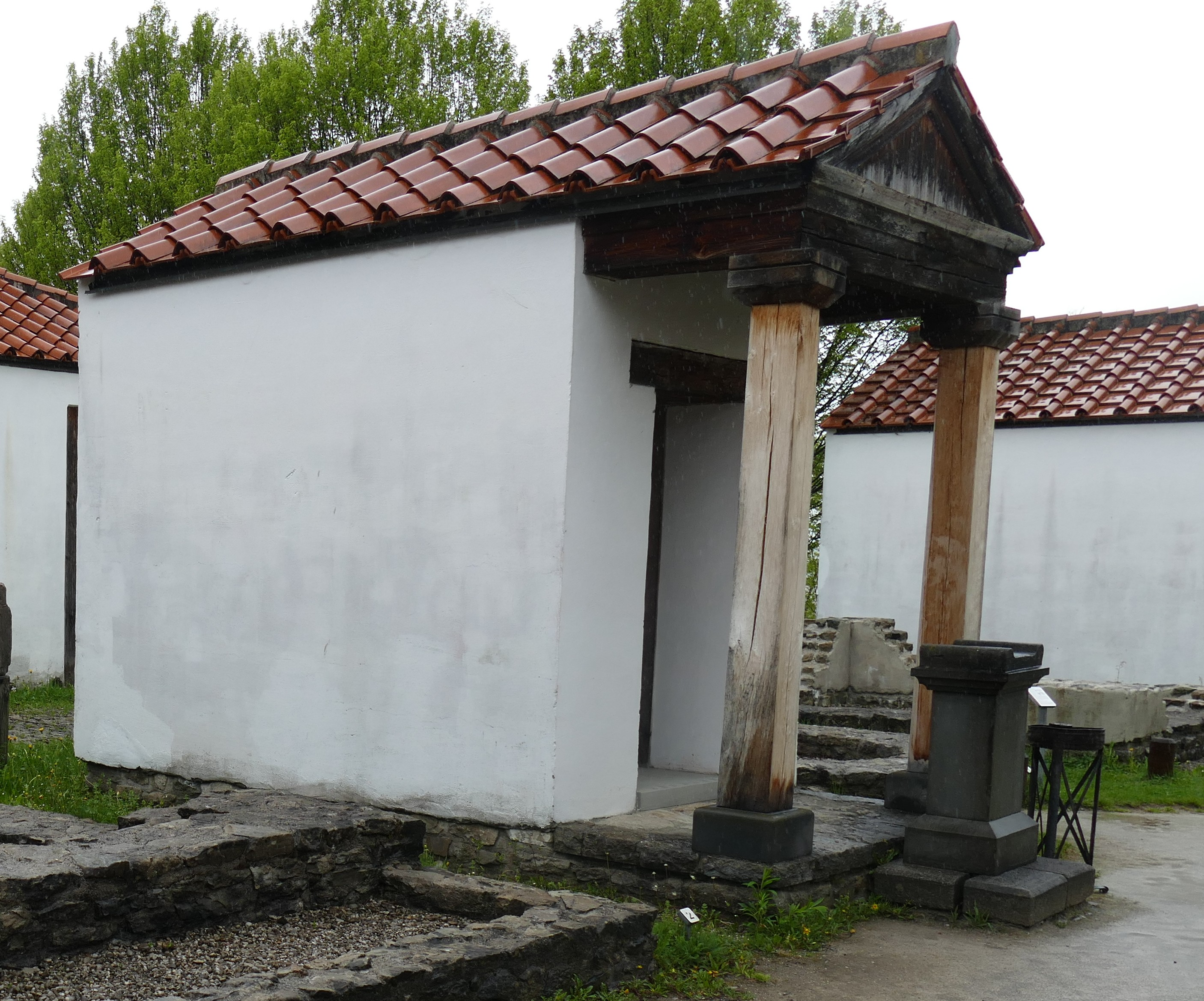 Rekunstruktion eines kleinen Rechecktempelchens in Cambudunum